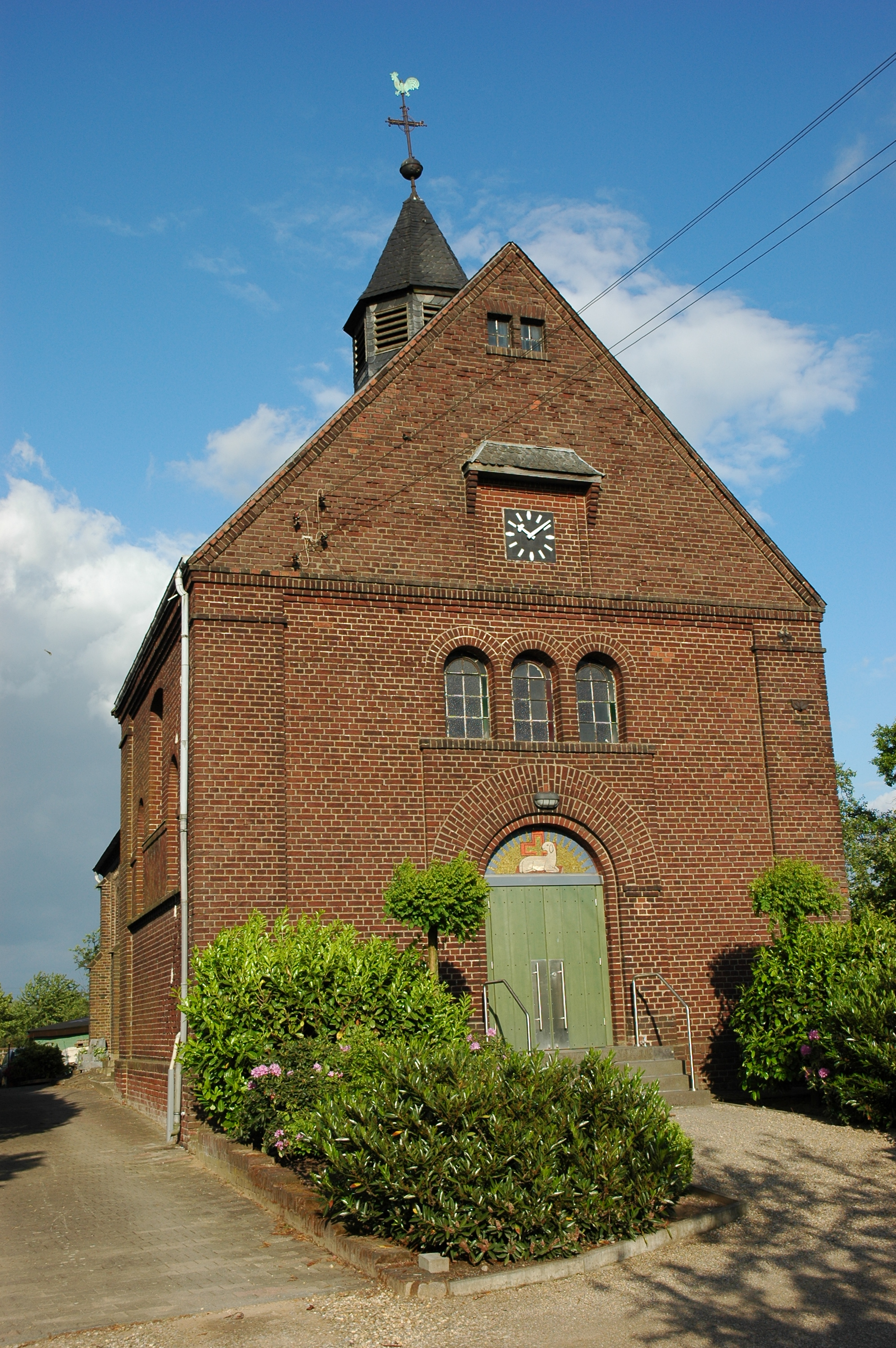 Kapelle Sankt Pankratius in Meerbusch Ossum-Bösinghoven